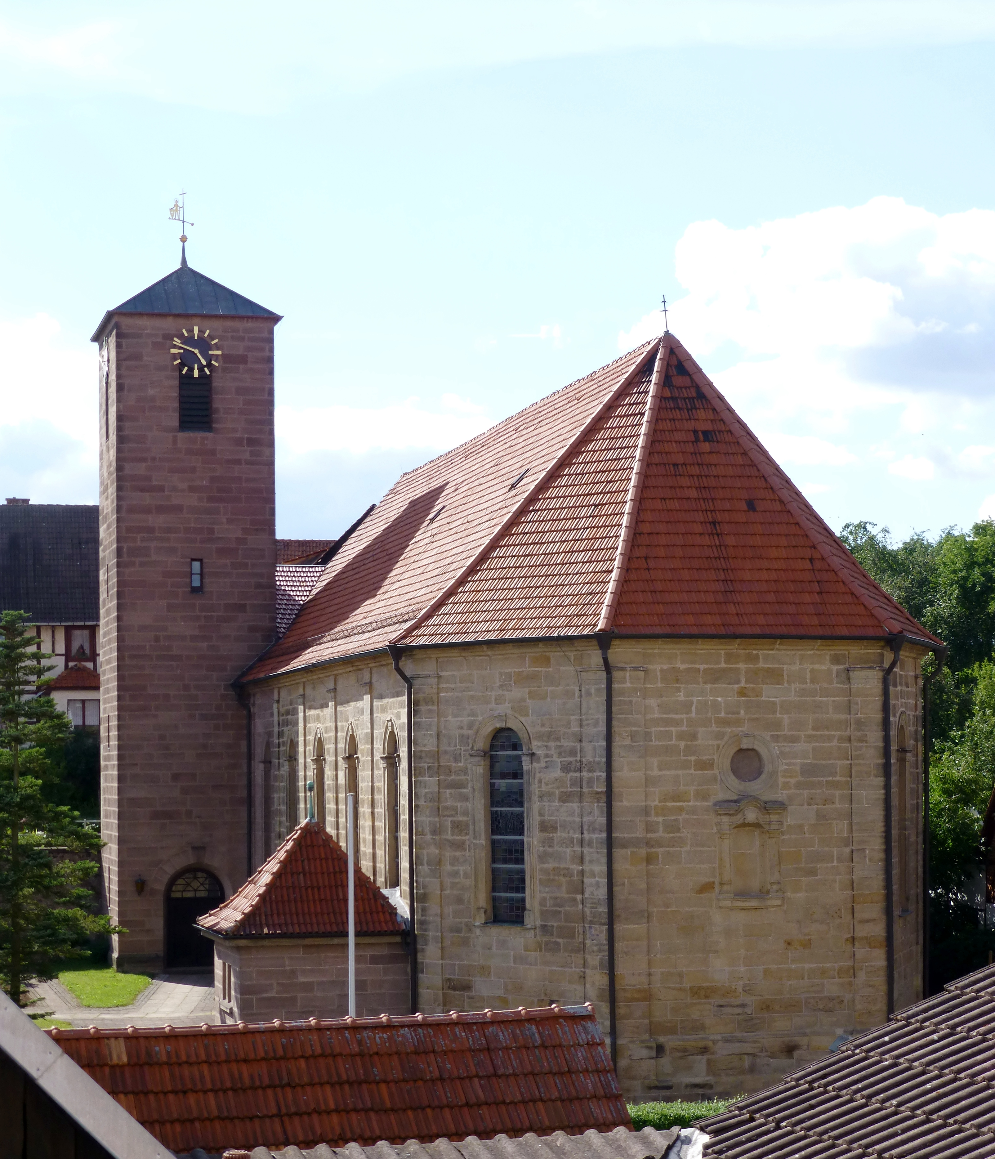 Kath. Kirche St. Mauritius in Steinbach, Landkreis Eichsfeld. Erbaut 1779, Turm jünger